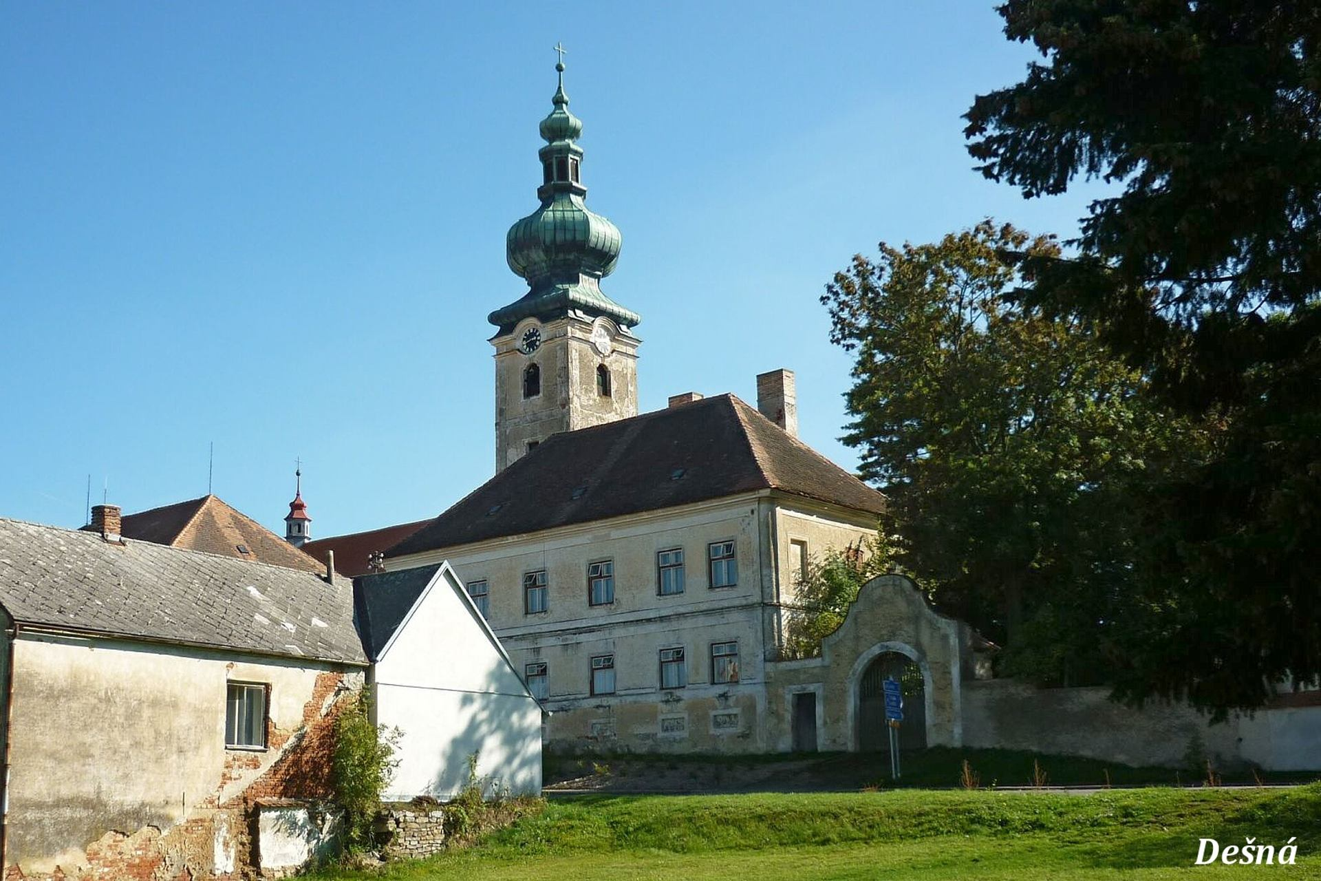 Kostel Narození svatého Jana Křtitele v Dešné